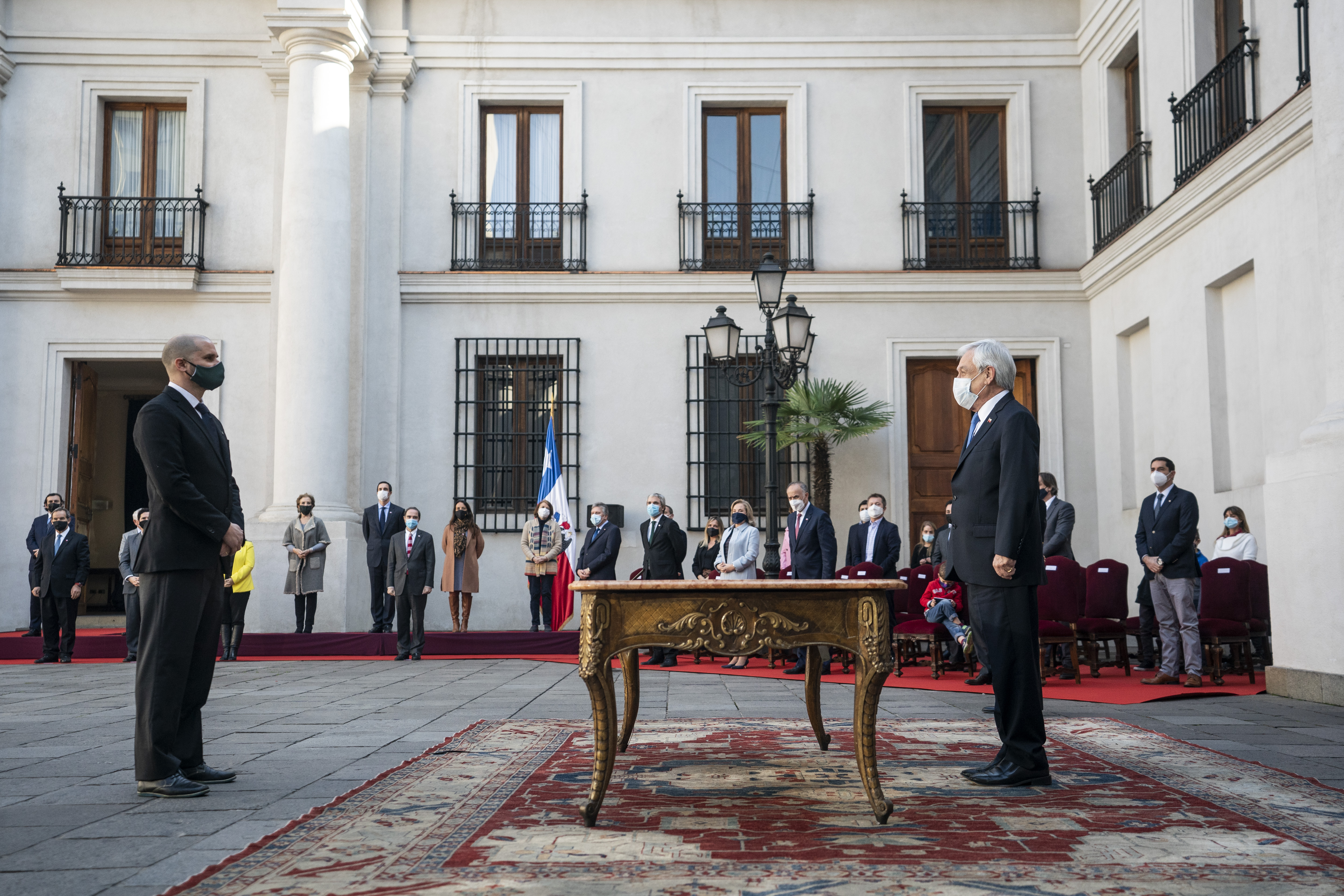 El presidente Sebastián Piñera toma juramento a Jaime Bellolio para ser nombrado Ministro Secretario General de Gobierno de Chile.